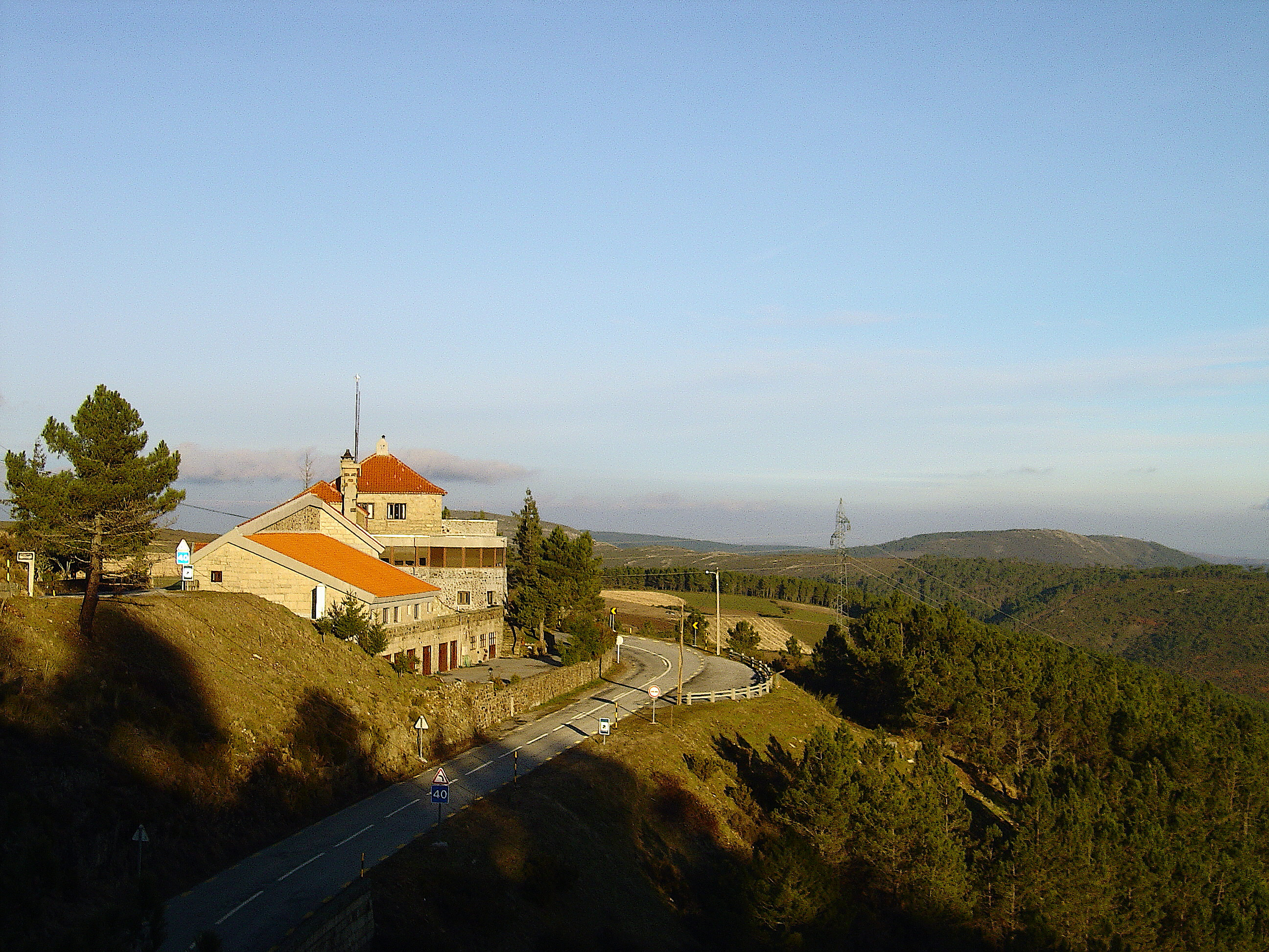 Pousada de S. Lourenço - Manteigas Fotografia de Vitor Oliveira, integrada na colecção com o endereço